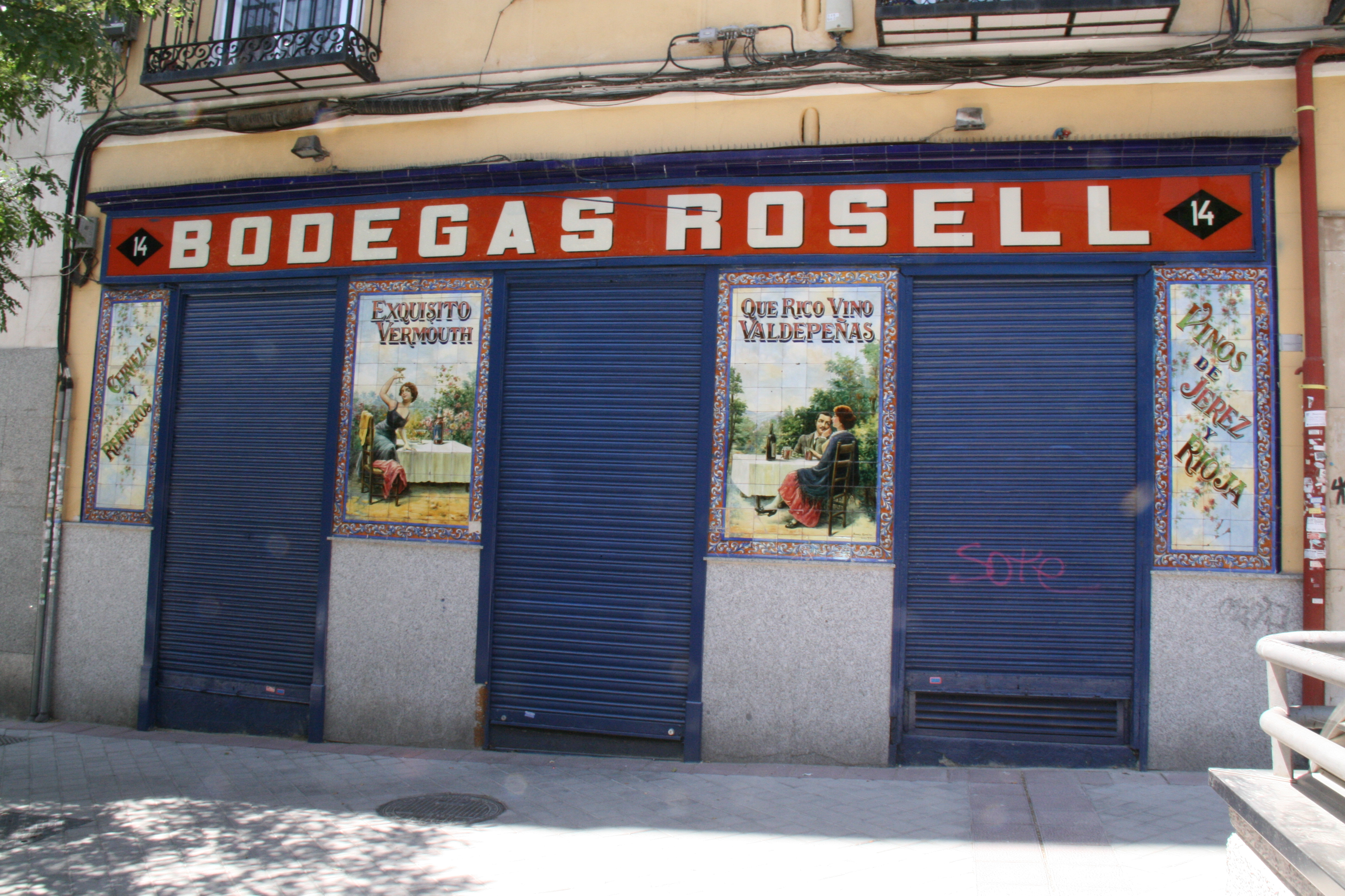 Bodegas Rosell - General Lacy 14 (Madrid)